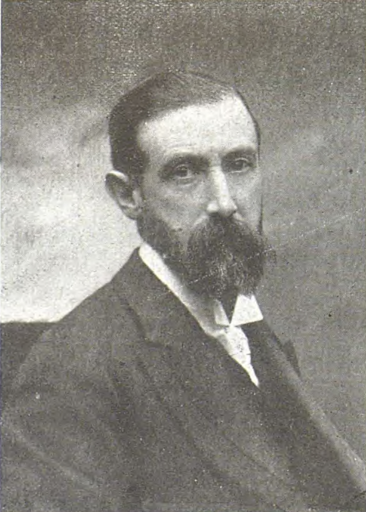 Retrato de Luis de Ocharan, obra del fotógrafo Kaulak, recogido en la revista española La Esfera.